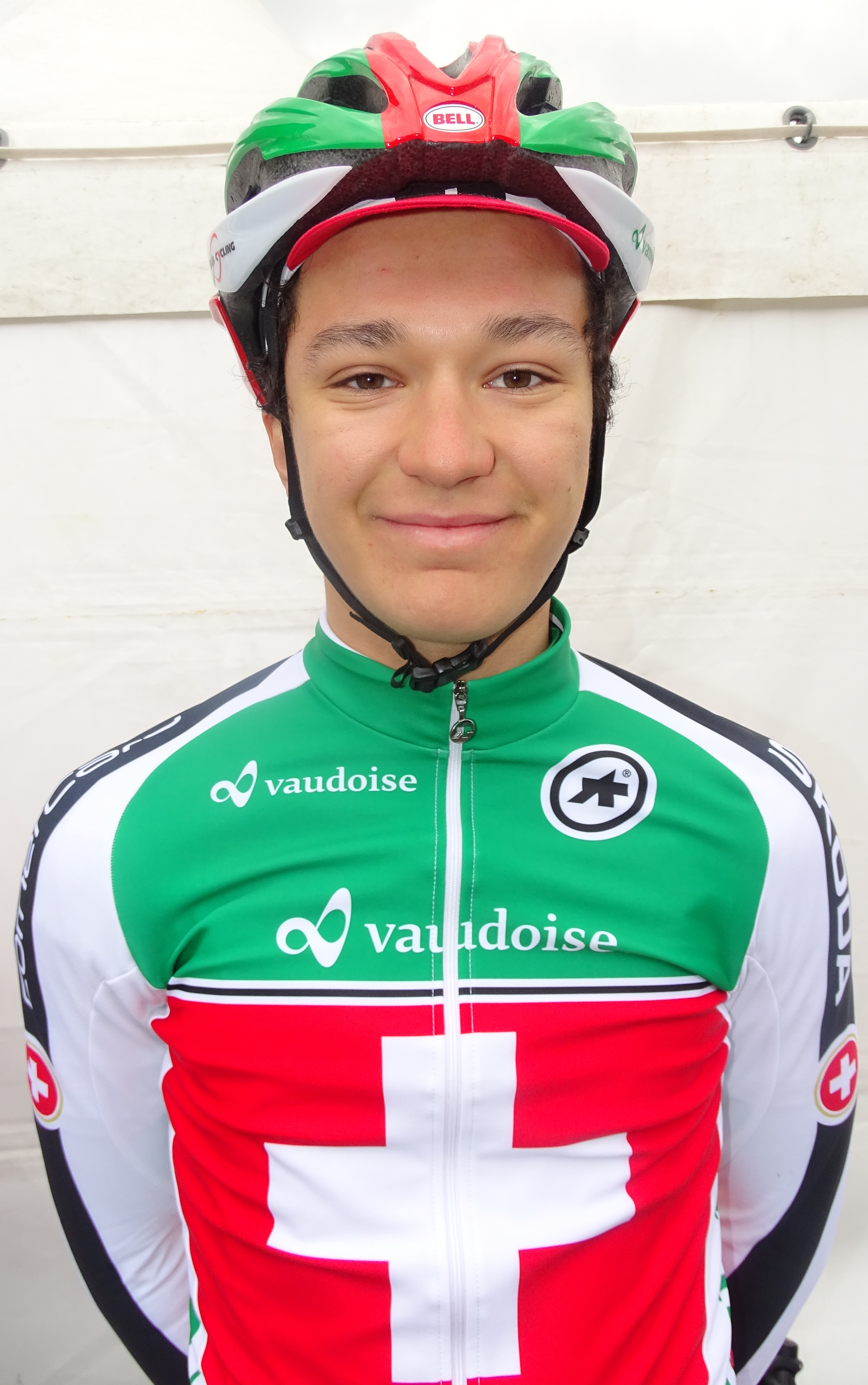 Reportage réalisé le samedi 11 avril à l'occasion du départ et de l'arrivée du Tour des Flandres espoirs 2015 à Audenarde, Belgique.